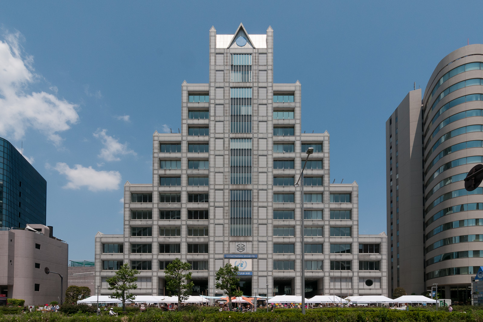 国連大学本部、東京都渋谷区神宮前5丁目。